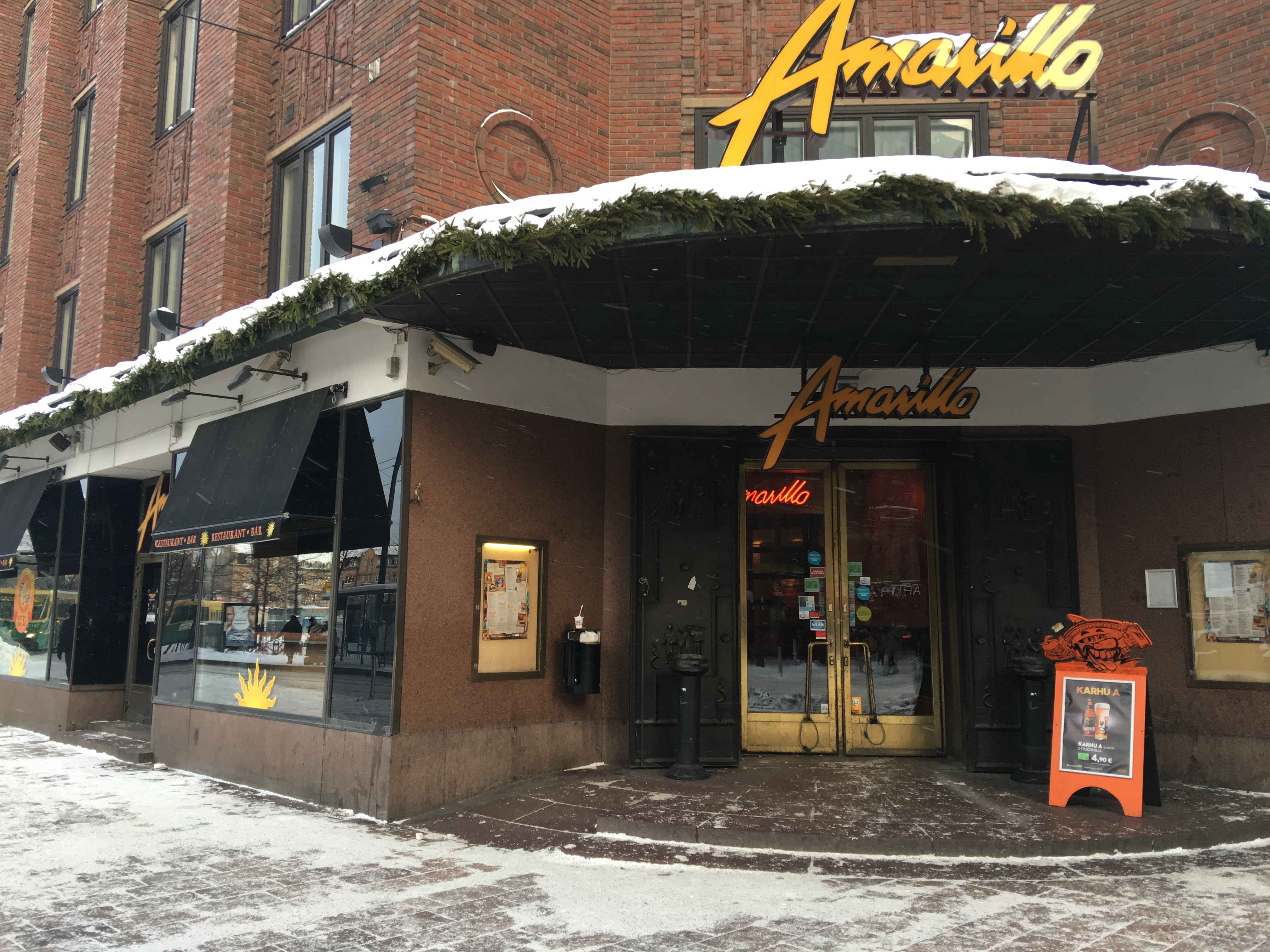 Amarillo-ravintola osoitteessa Mikonkatu 9.